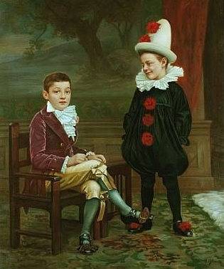 Hans Kugler: Ohne Titel. Öl auf Leinwand, 99,1 x 82,6 cm. Privatbesitz